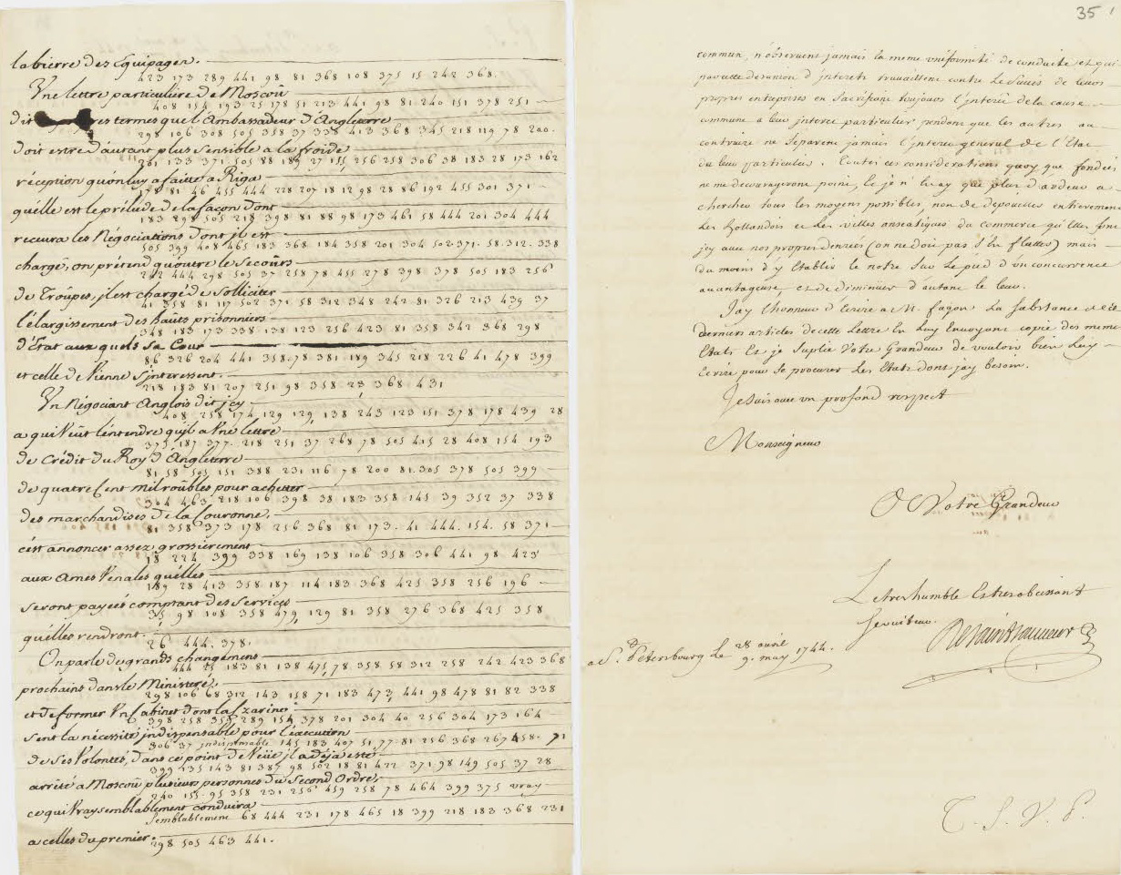 Lettre de Jean–Baptiste Décury de Saint–Sauveur, consul à Saint–Pétersbourg auprès de la tsarine Élisabeth I ère , au comte Jean–Frédéric Phélypeaux de Maurepas, secrétaire de la Marine, faisant suite au renvoi du consul M. de La Chétardie